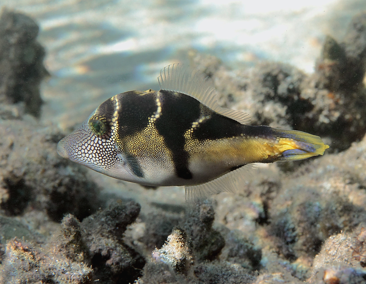 Un monacanthe à selles noires (Paraluteres prionurus) en livrée nuptiale à la Réunion. Observez la longueur de la nageoire dorsale, qui le distingue de Canthigaster valentini.